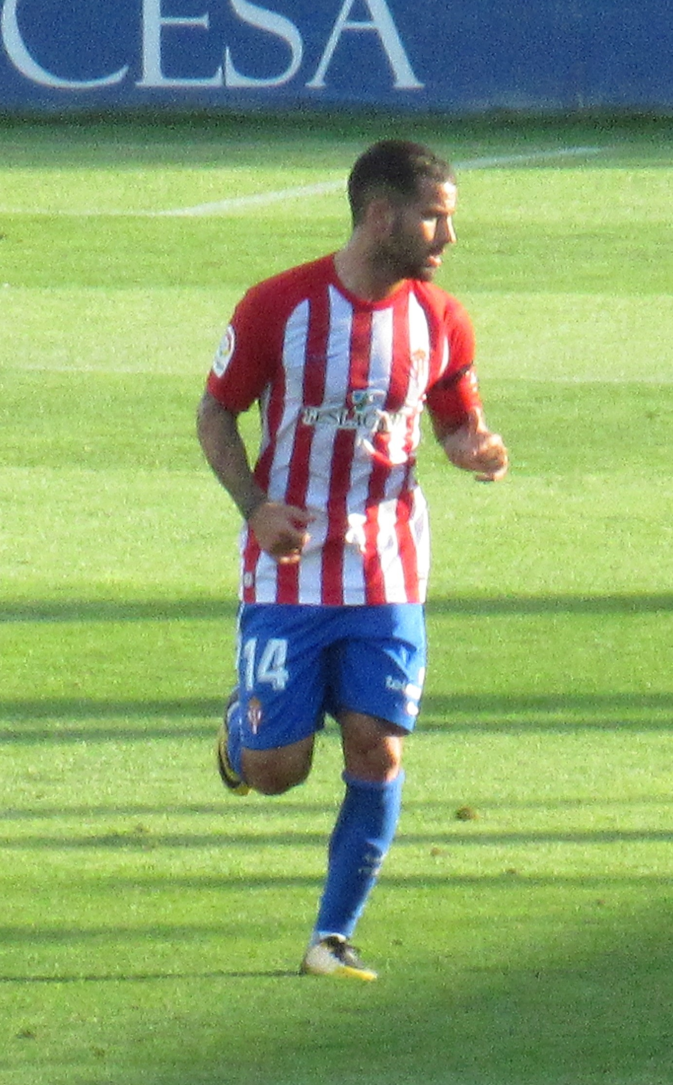 Rubén García, durante el Alcorcón-Sporting de la temporada 2017-18